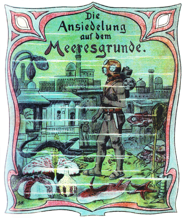 Die Ansiedelung auf dem Meeresgrunde. Titelbild des Heftromans.